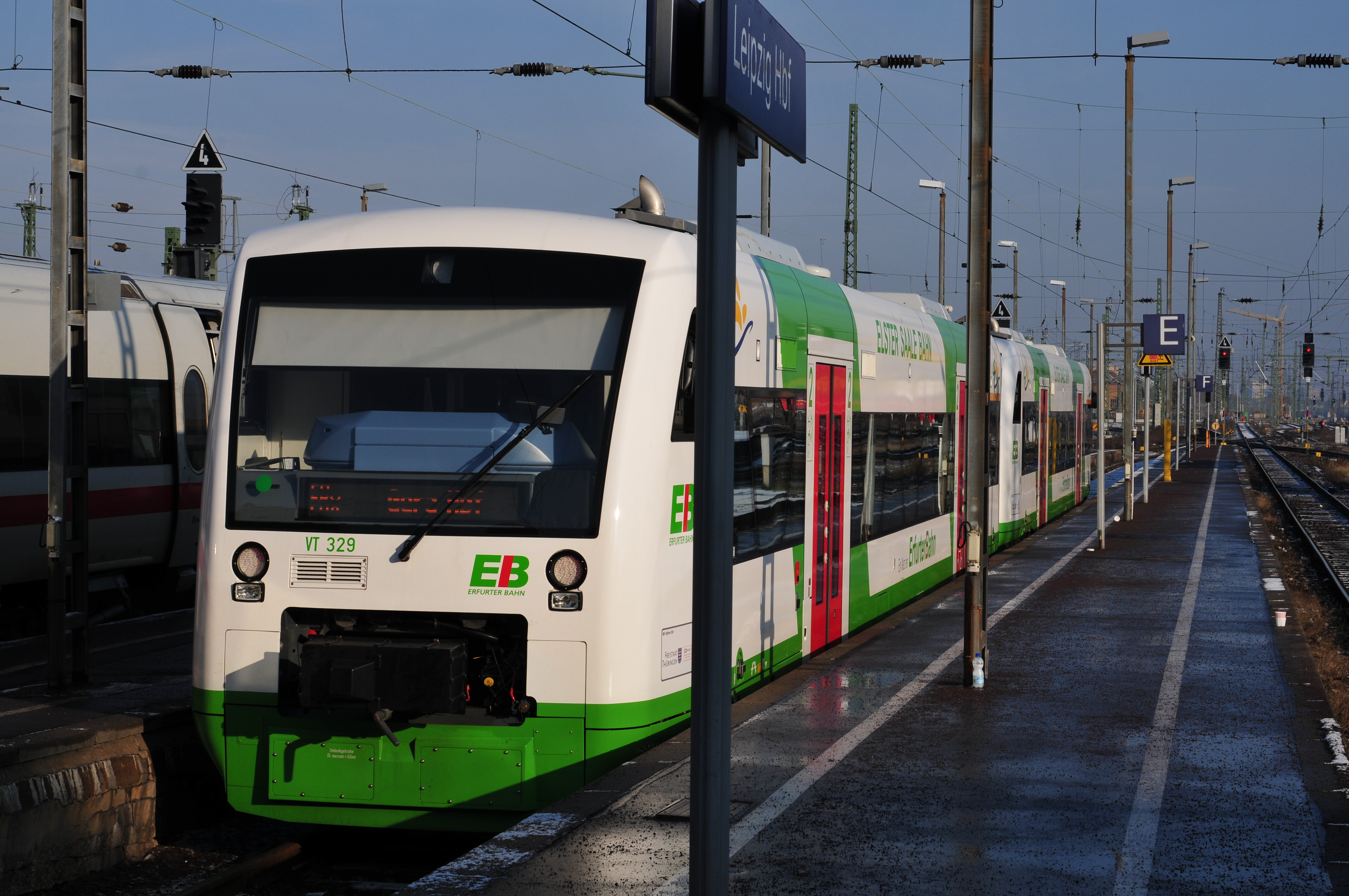 Bahnhof Leipzig nochmal ein Blick zur Seite, 50 mm paßt.